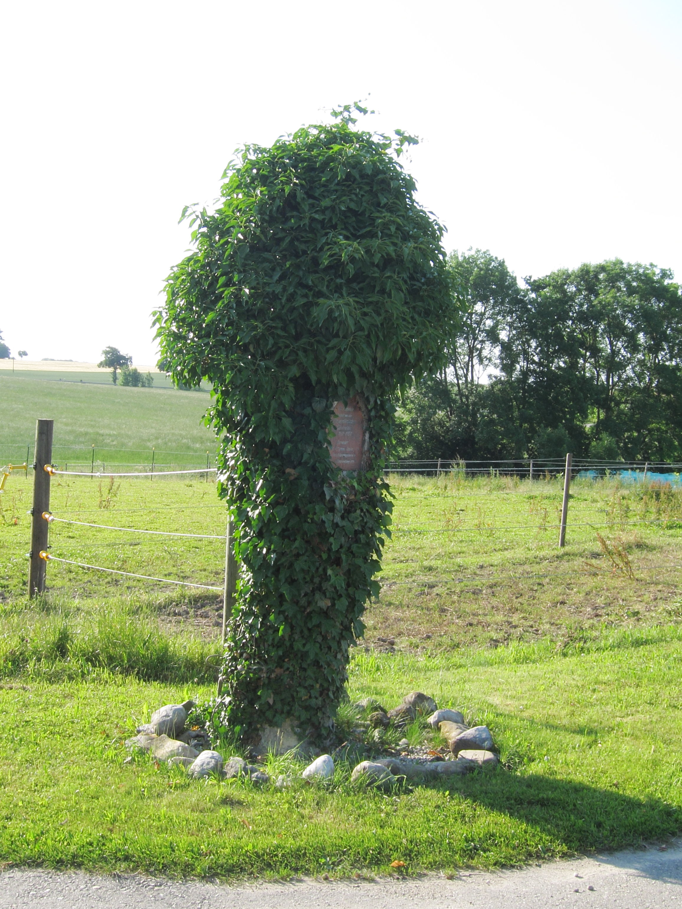 Indorf; Pestsäule, Tuffsäule in gotischen Formen, errichtet 1681-98.